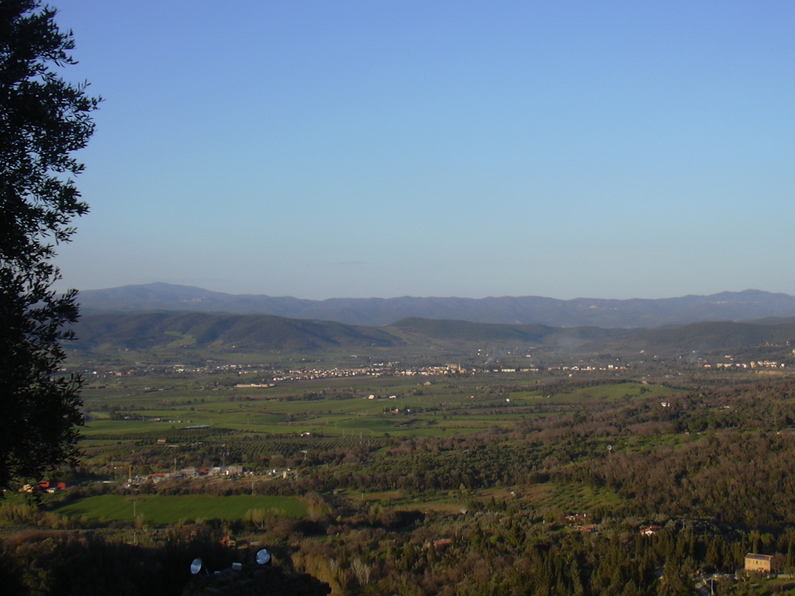 Strada del Vino, Part B, Tuscany/Italy